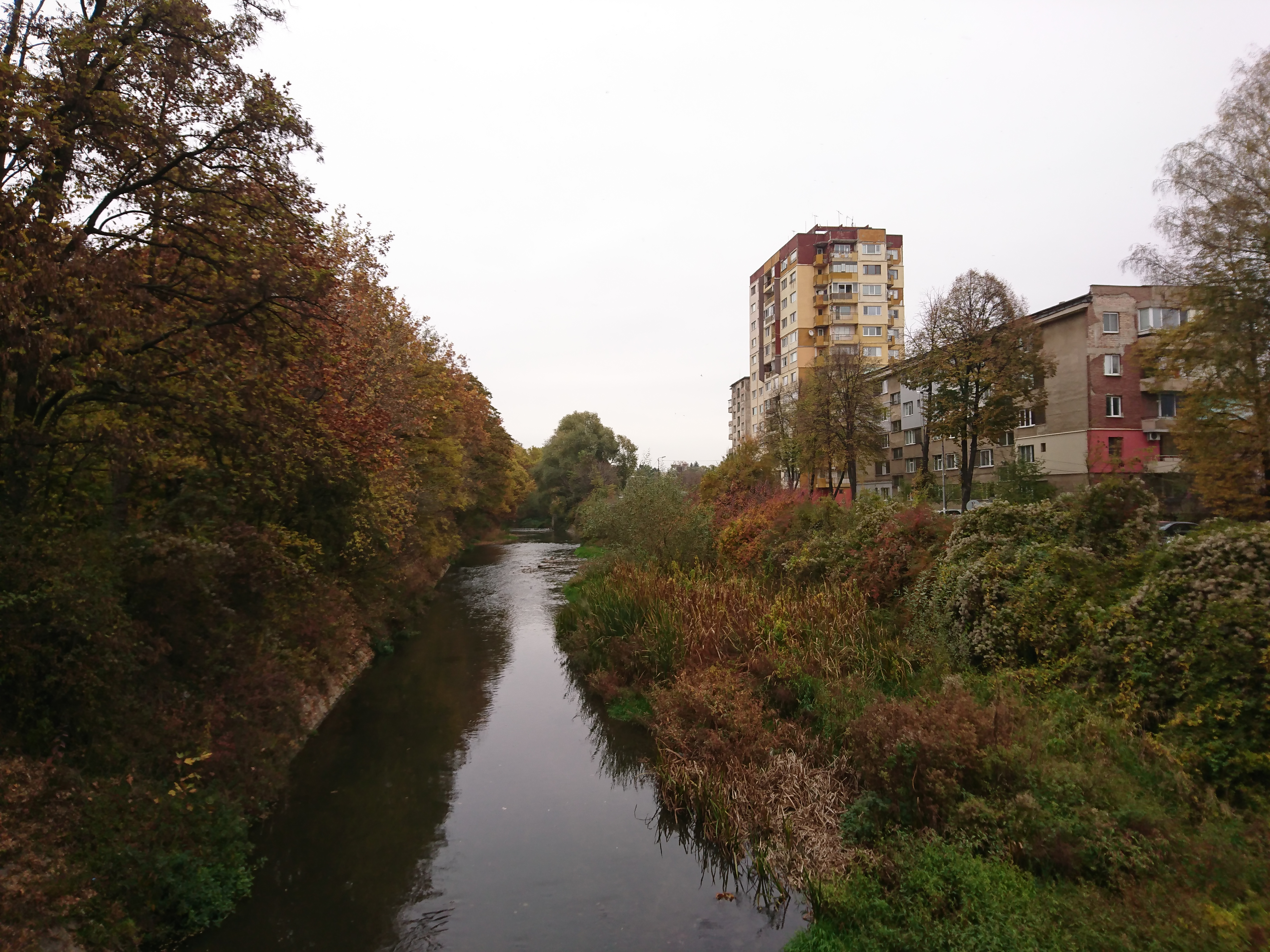 Река Струма в гр. Перник през есента.